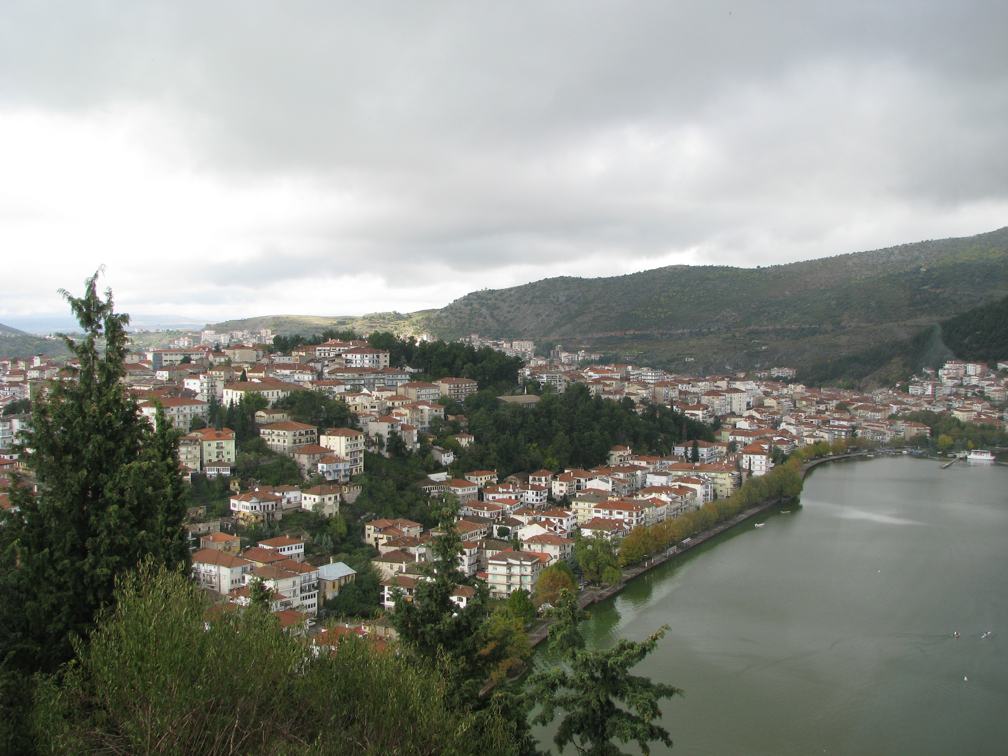 Изглед към Костур, Егейска Македония, Гърция.